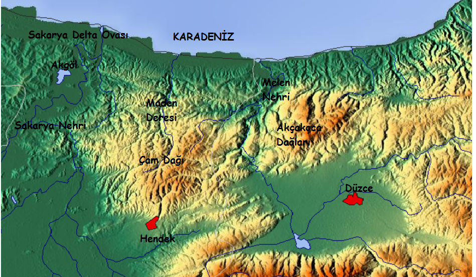 Çamdağı ve yakın çevresi.